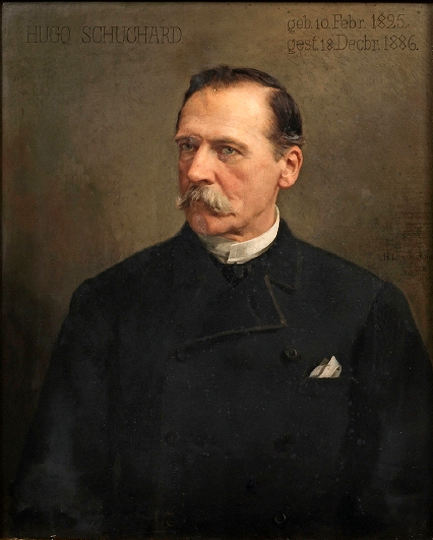 Portrait, 1825-1886